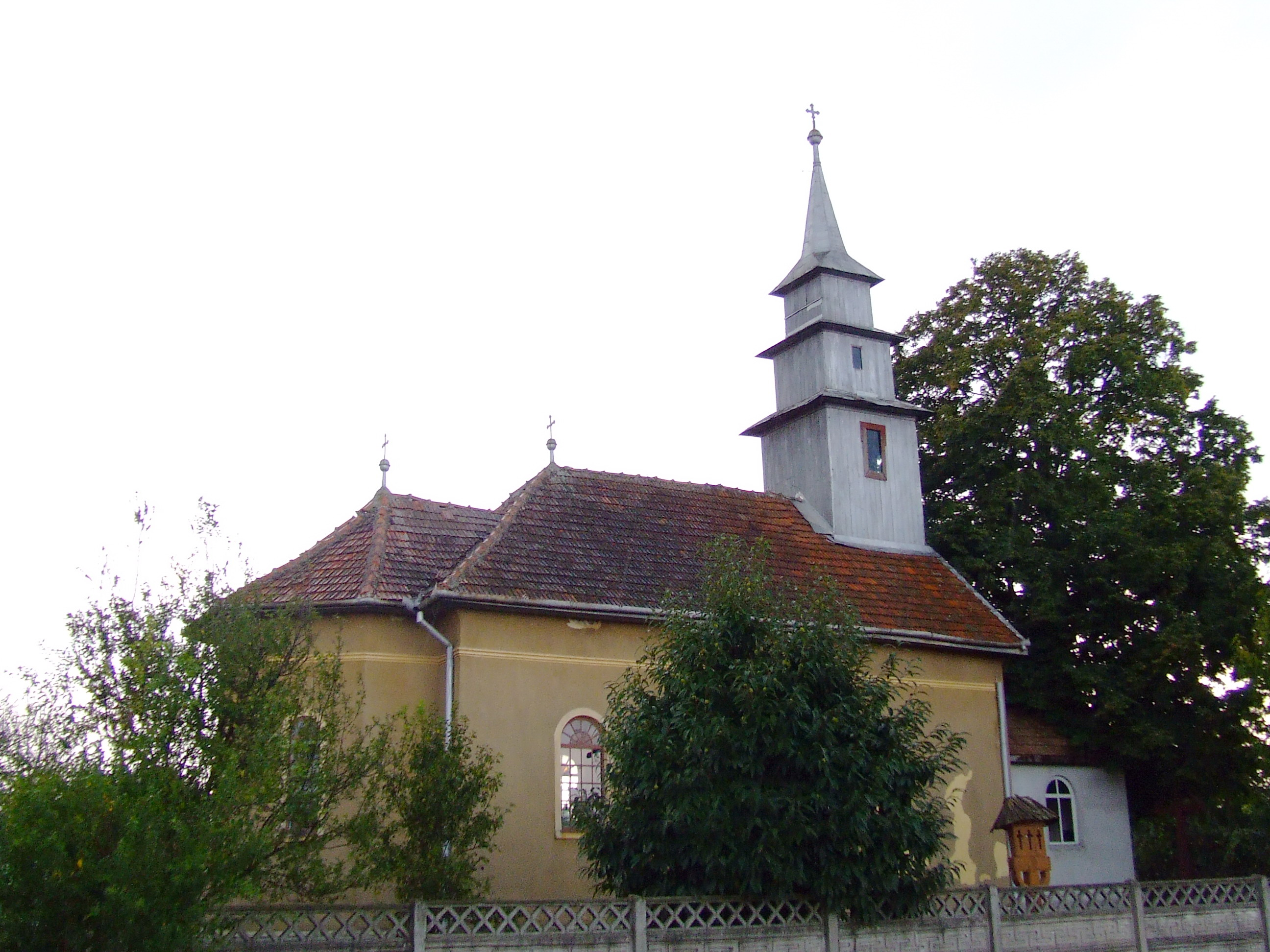 Biserica de lemn din Lazuri, judeţul Satu Mare.